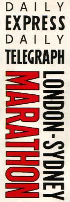 Это логотип ралли-рейда Лондон — Сидней